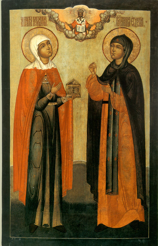 в. Мария Магдалина Преподобная Евдокия. Святые предстоят перед образом Спасителя, изображеннном в виде Великого Архиерея. Текст Раскрытого евангелия - (Мк 11, 24). Москва. Оружейная палата Московского Кремля. 1670-е гг. Дерево, левкас, темпера. 112 х 71 см. Происходит из церкви Троицы в Ознобишине под Москвой. Икона написана по заказу Хитрово Б.М. (1615-80) как образ святых покровителей его жены, Марии Ивановны Хитрово, и ее матери, княгини Евдокии Буйносовой-Ростовской. Музей-заповедник "Коломенское" (Инв ж - 554)